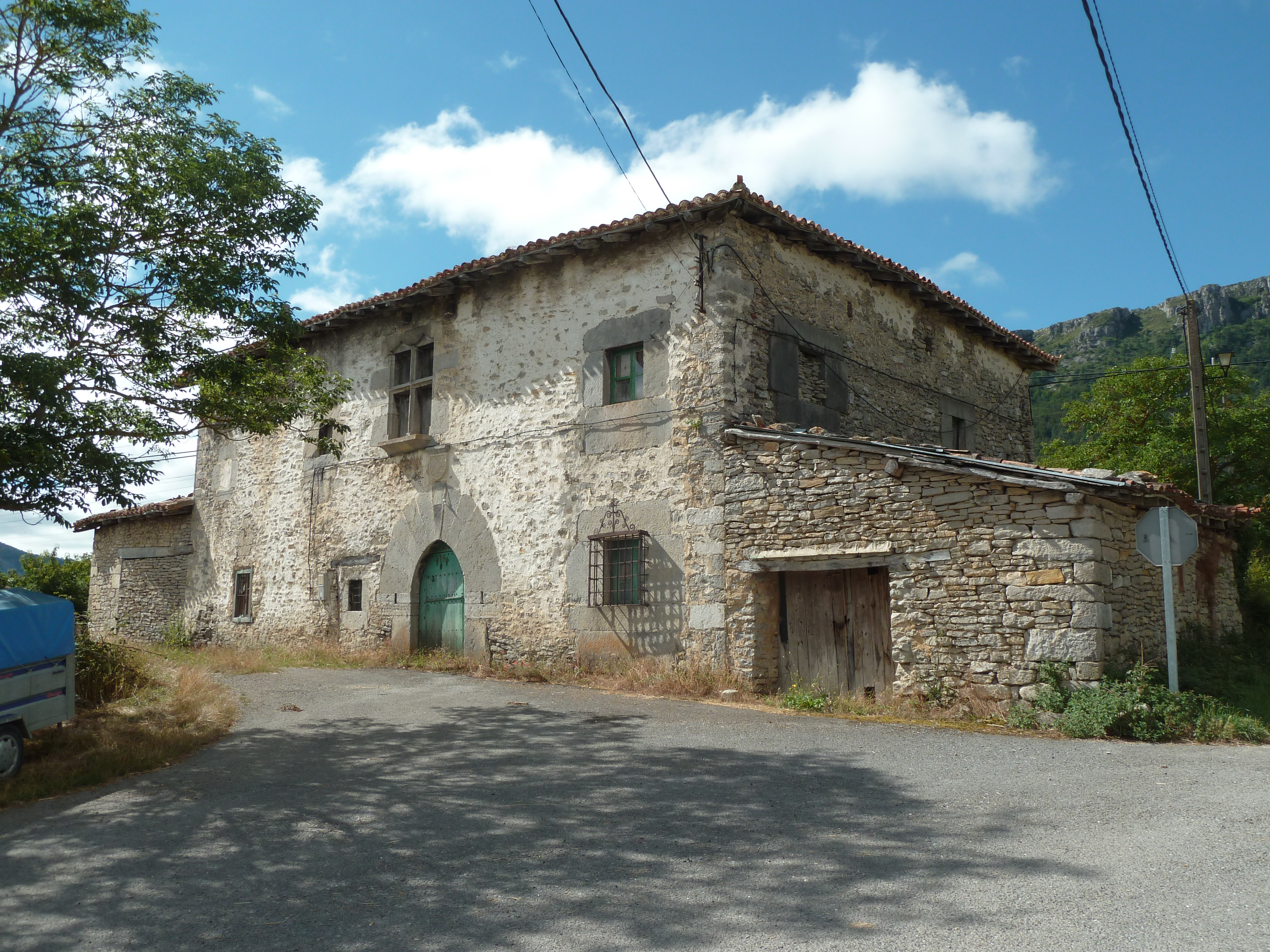 Jokanotarren etxea